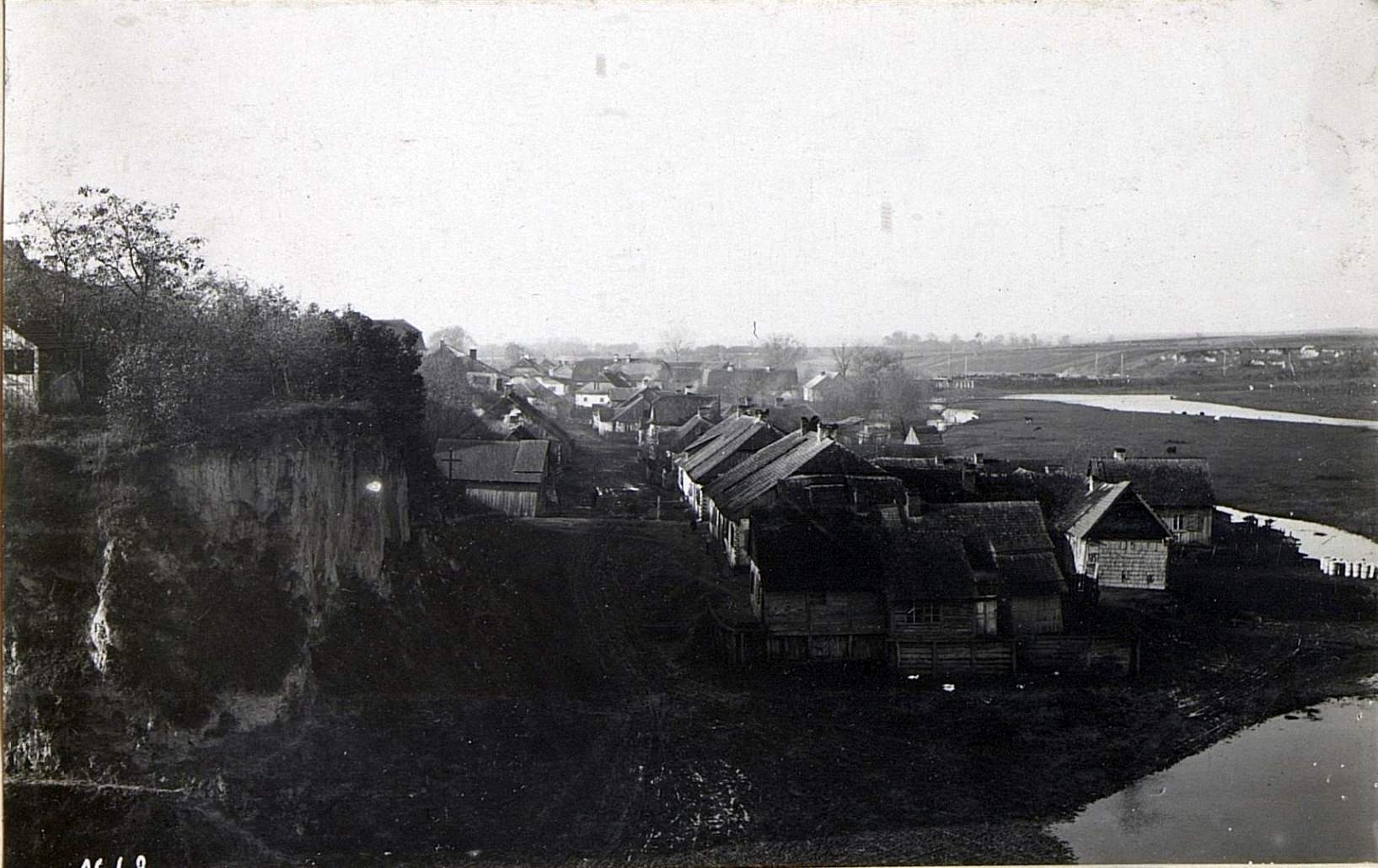 Häuser an der Huczwa bei Hrubiszow.